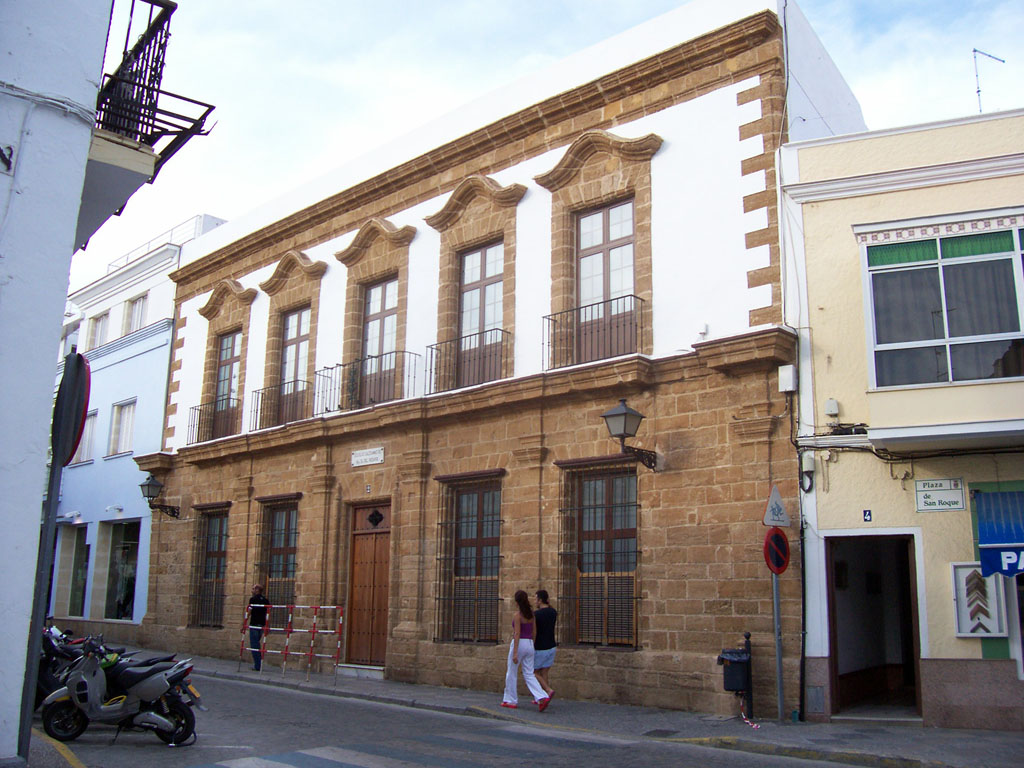 Colegio Nuestra Señora del Rosario (Salesianos), en la calle María Auxiliadora nº 2, en Rota-Cádiz-Andalucía-España. Fachada realizada en piedra ostionera.